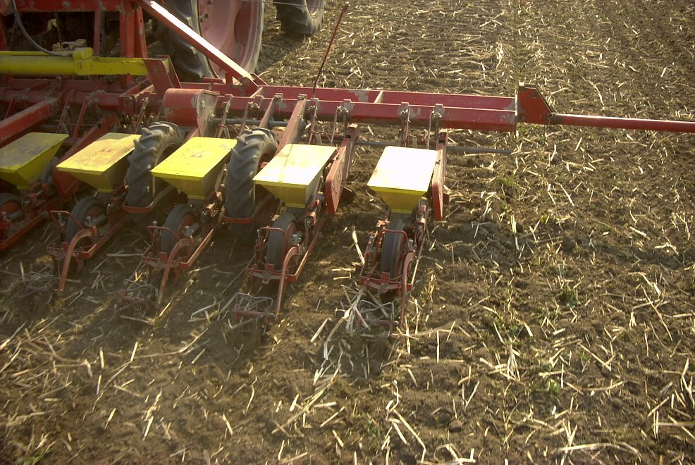 Siew burakow w mulcz